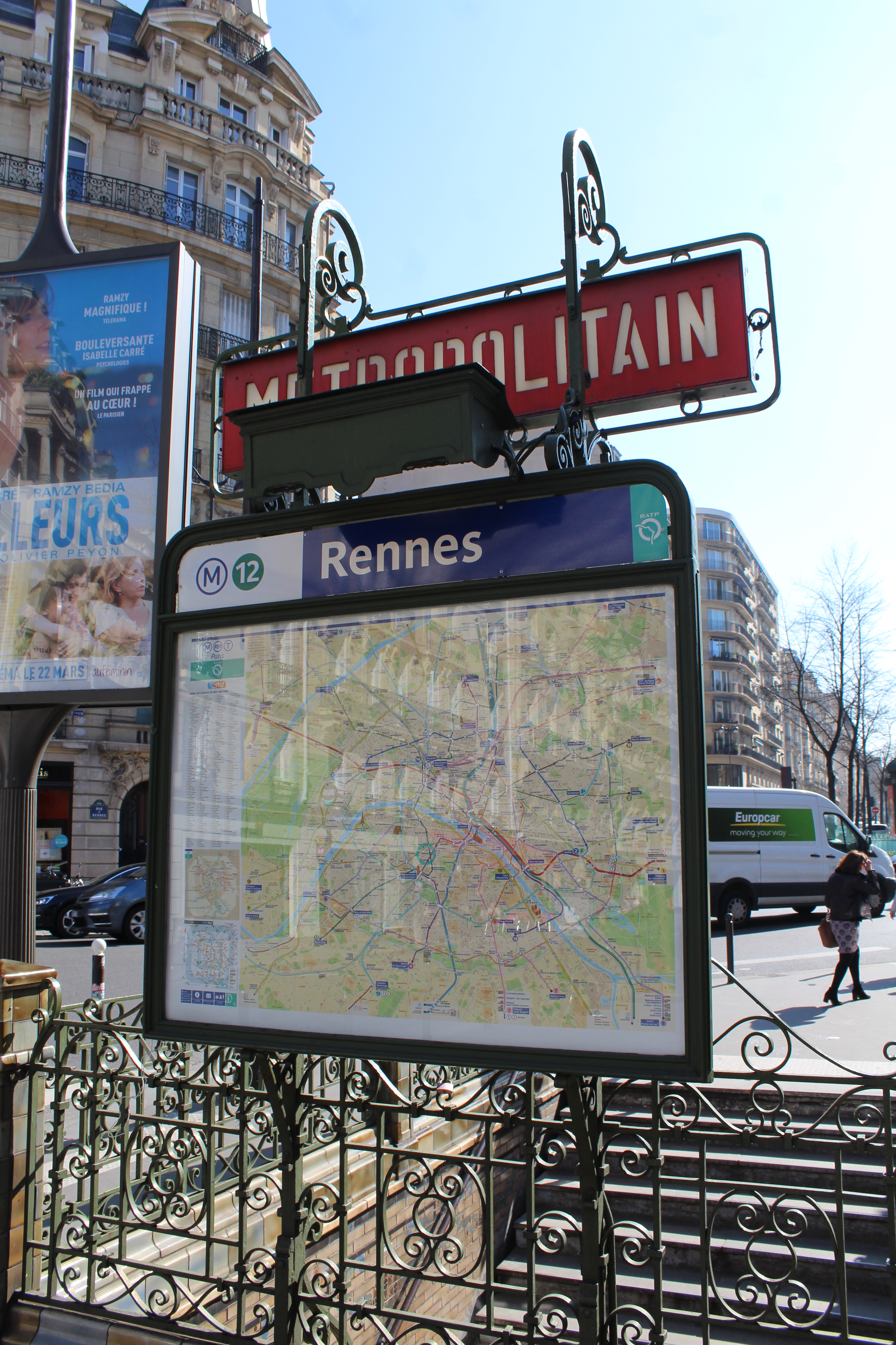 Entrée de la station de métro Rennes à Paris.